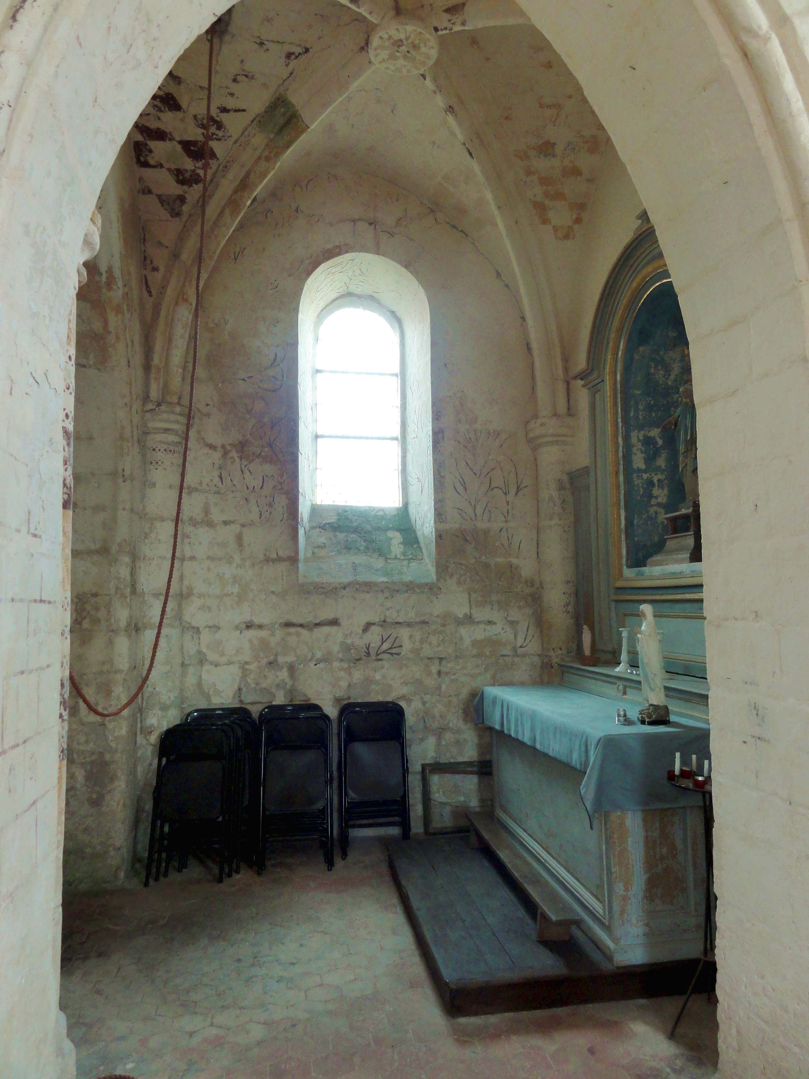 Intérieur de l'église (voir titre).